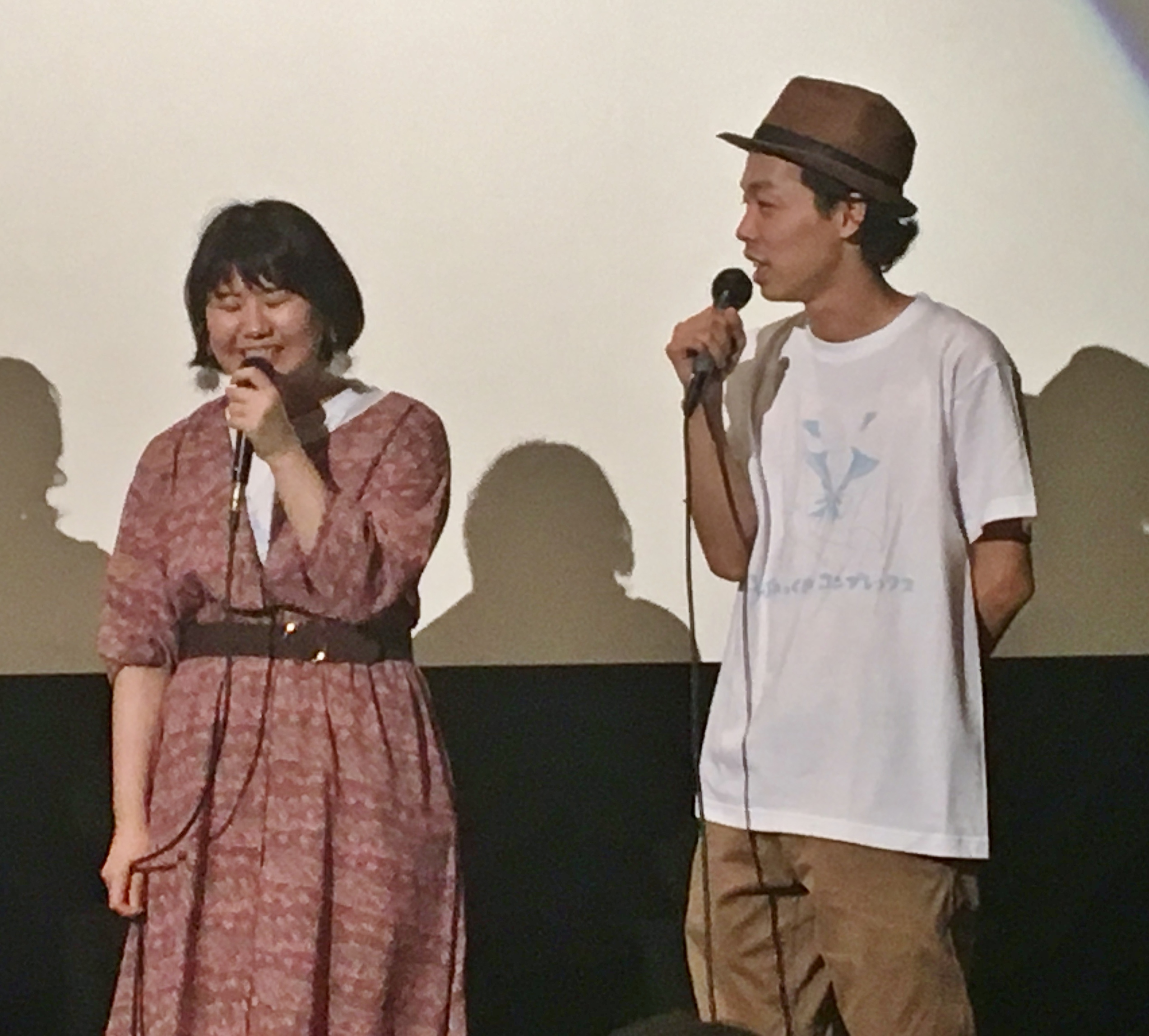 ふくだみゆきと上田慎一郎（2018年8月9日、新宿K's cinema） こんぷれっくす×コンプレックス舞台挨拶にて